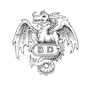 Dondorf-Drache, Logo der Druckerei B. Dondorf